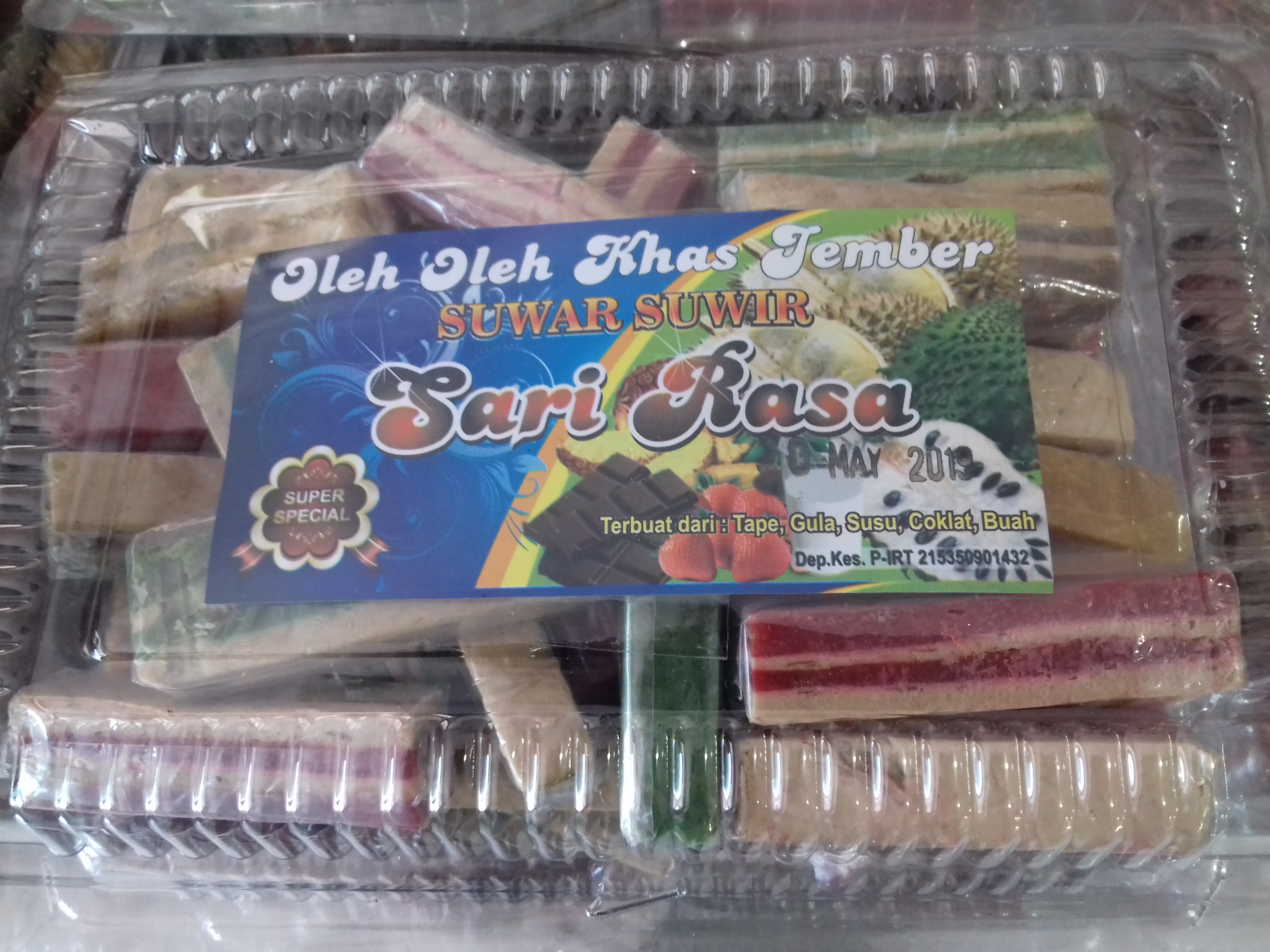 Olahan tape yang menjadi salah satu oleh-oleh khas Jember, Jawa Timur